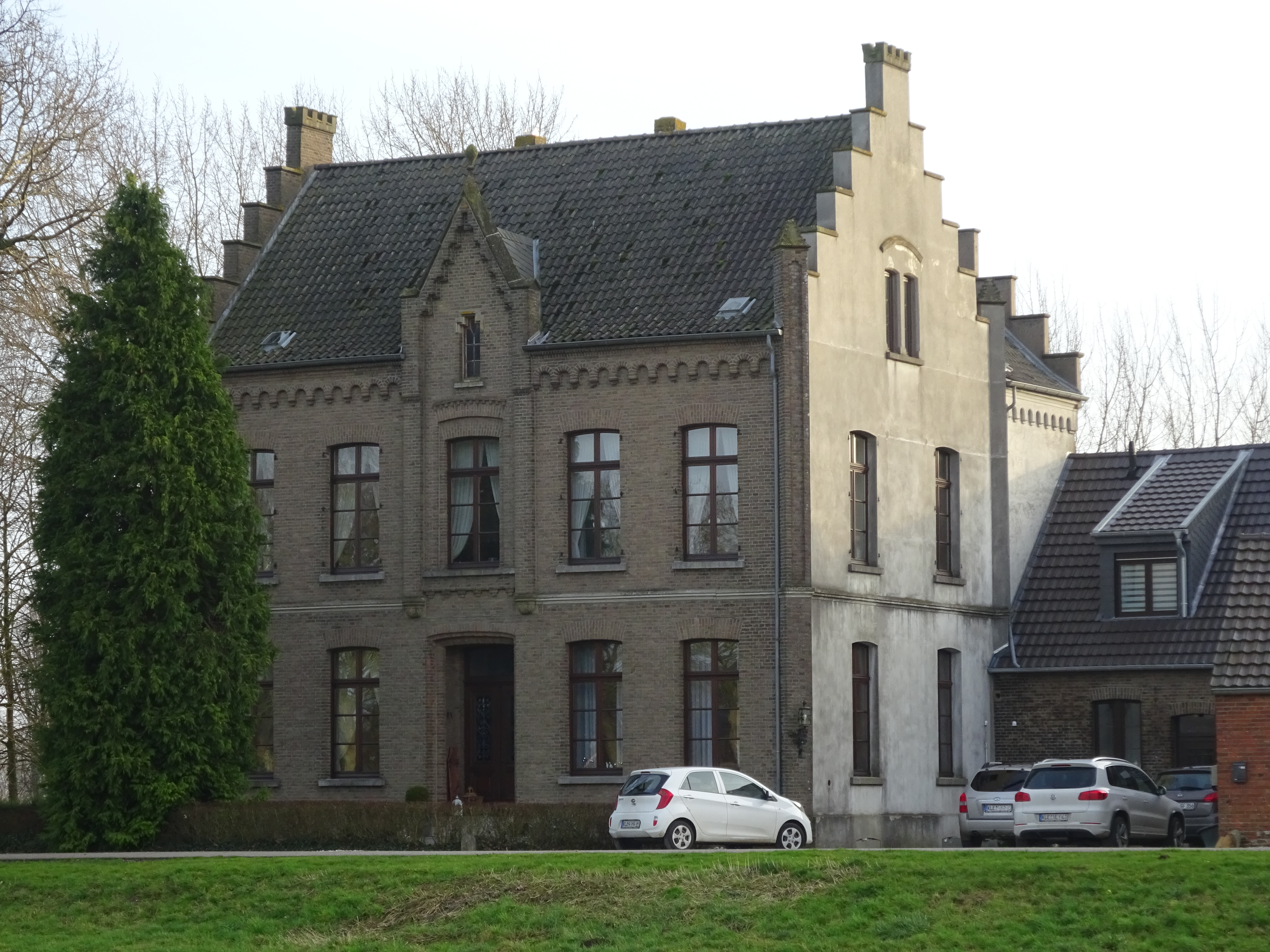 Kalkar-Wisselward Griether Straße (Baudenkmal Grieter Straße ~209)